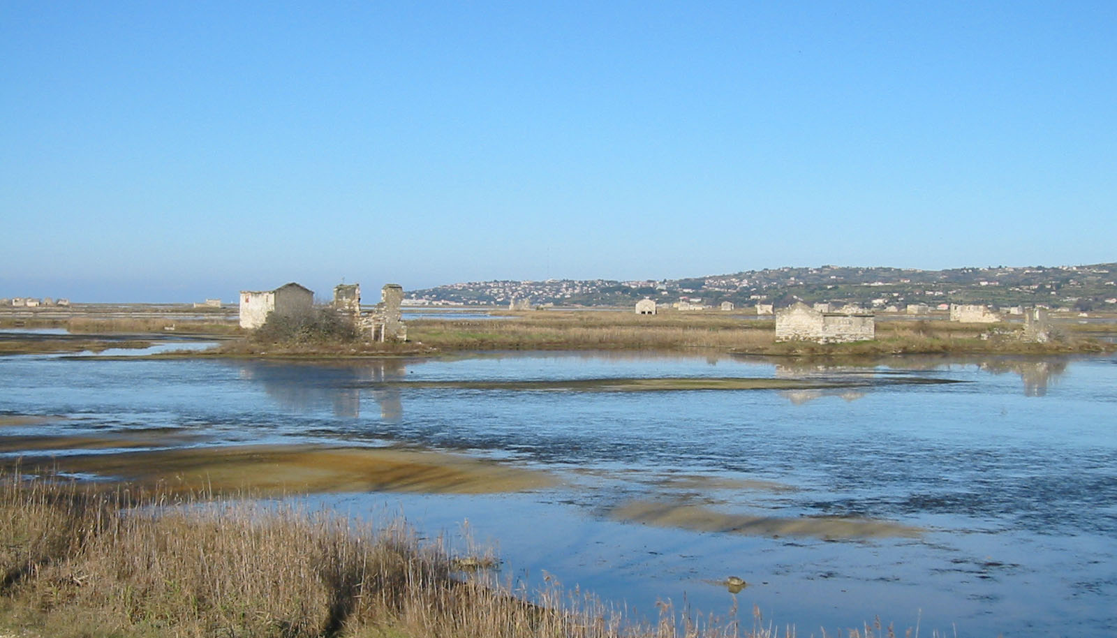 Soline v Sečovljah, Slovenia